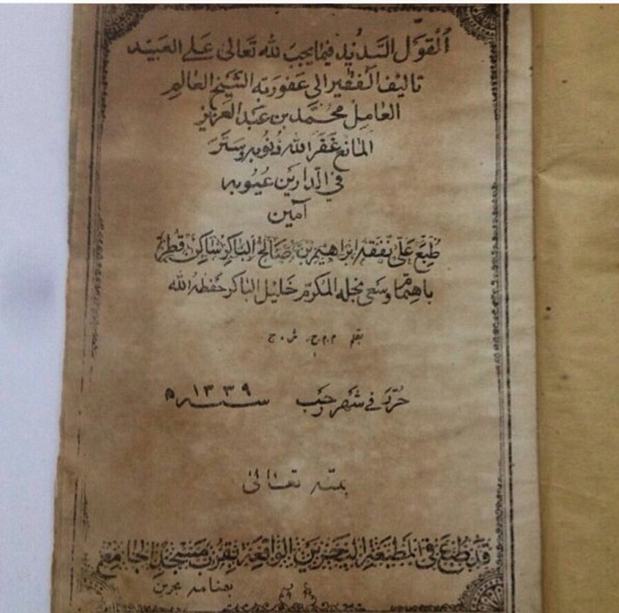 الطواش خليل بن ابراهيم الباكر